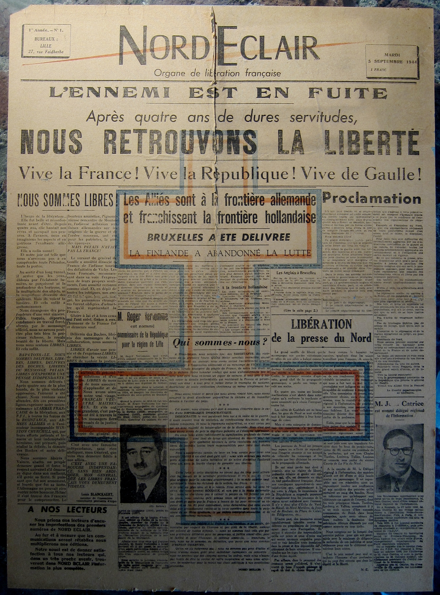 L'édition du 5 septembre 1944 de Nord Éclair au musée de la Résistance à Bondues (Nord).